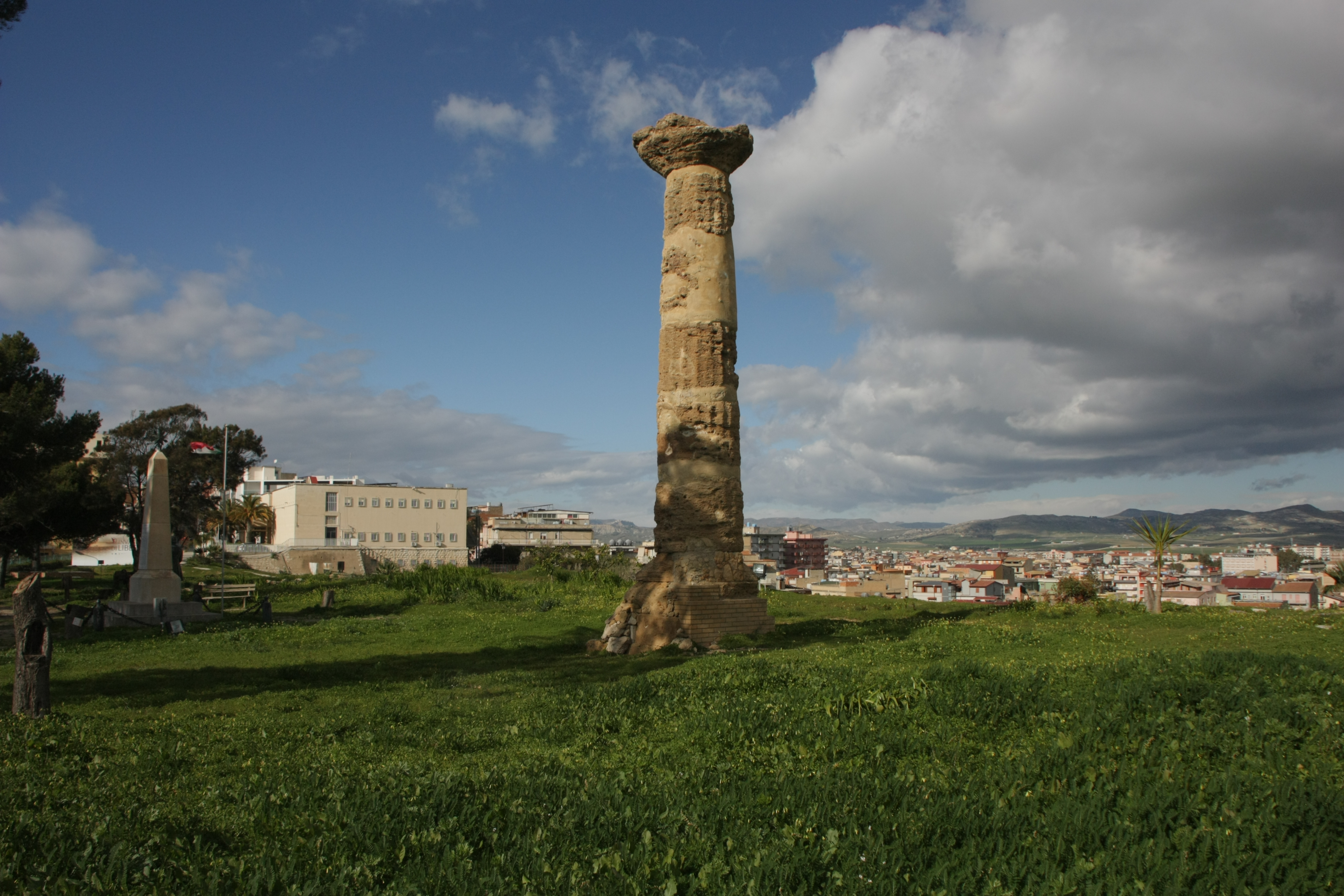 Acropoli di Gela